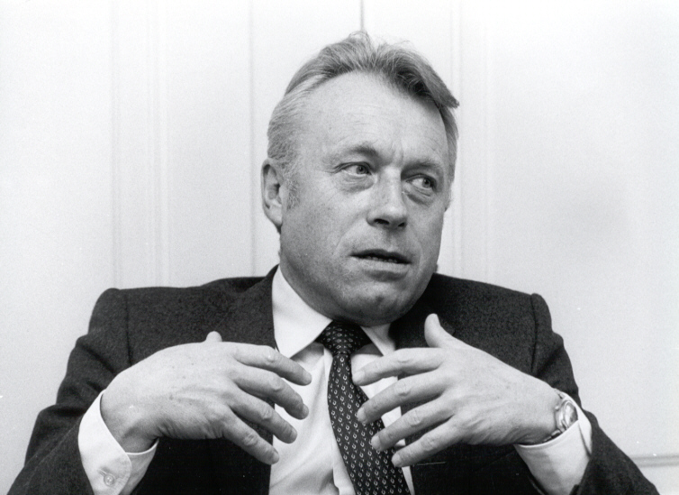 Kurt Meyer, Berner Regierungs- und Nationalrat